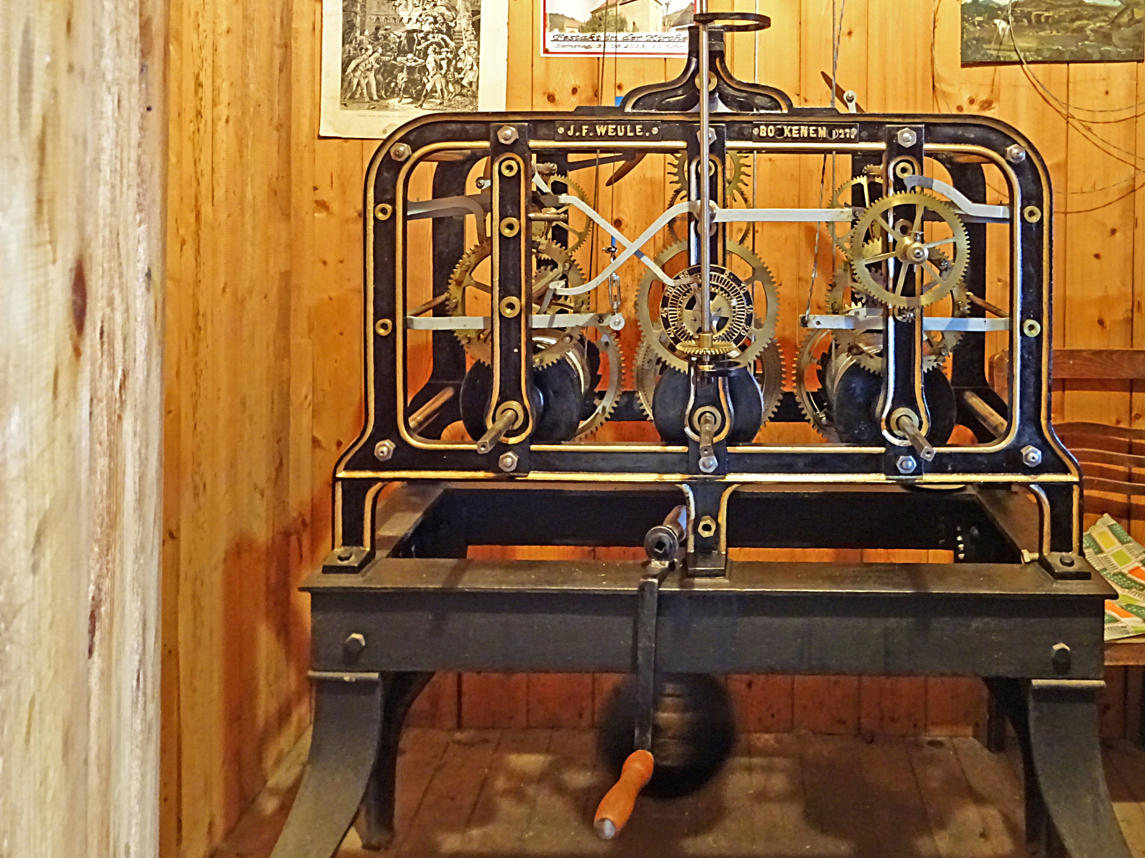 Turmuhr von Johann Friedrich Weule (Bockenem 1927) in der Dorfkirche Ammerbach